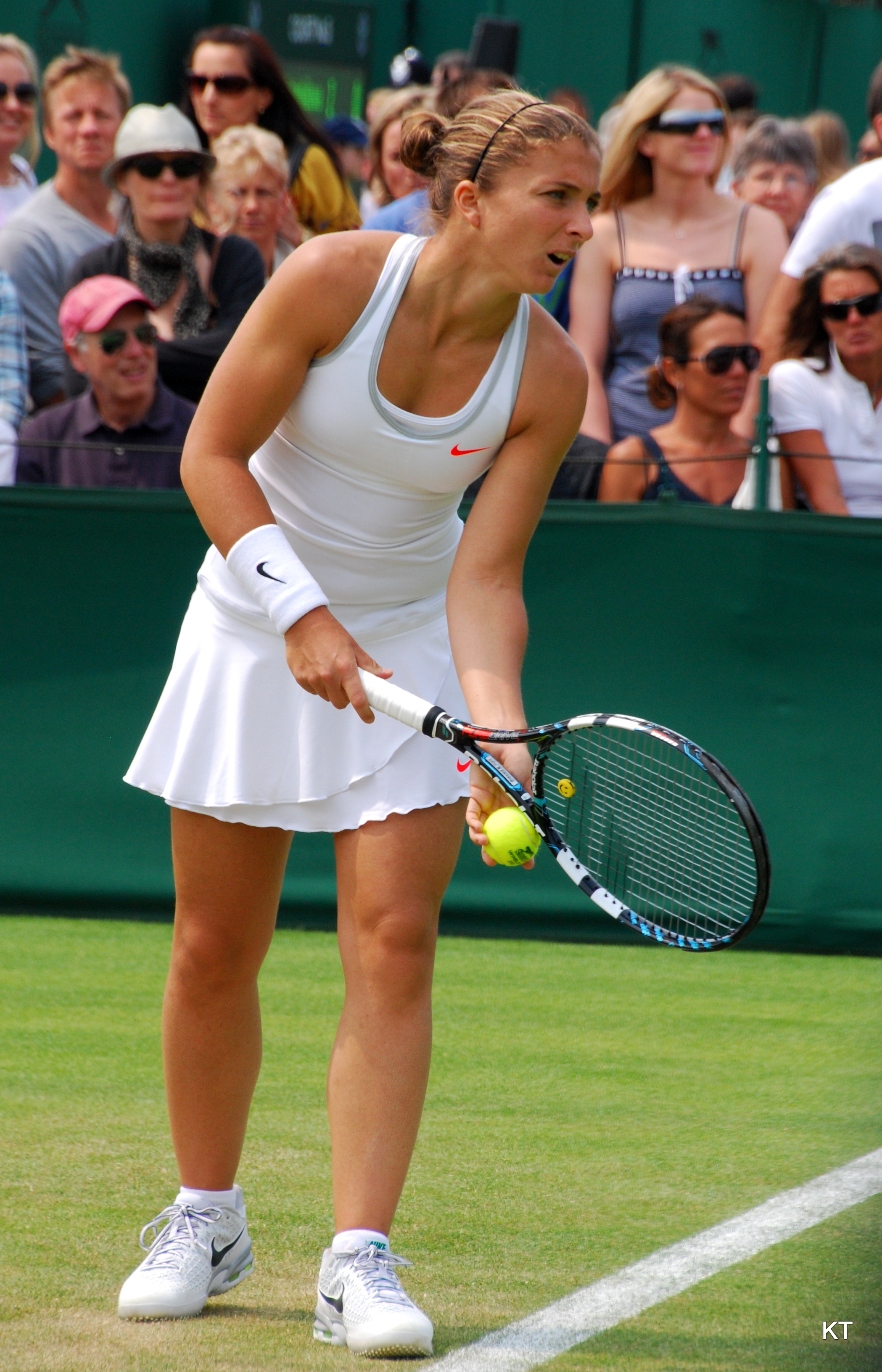 Sara Errani serve